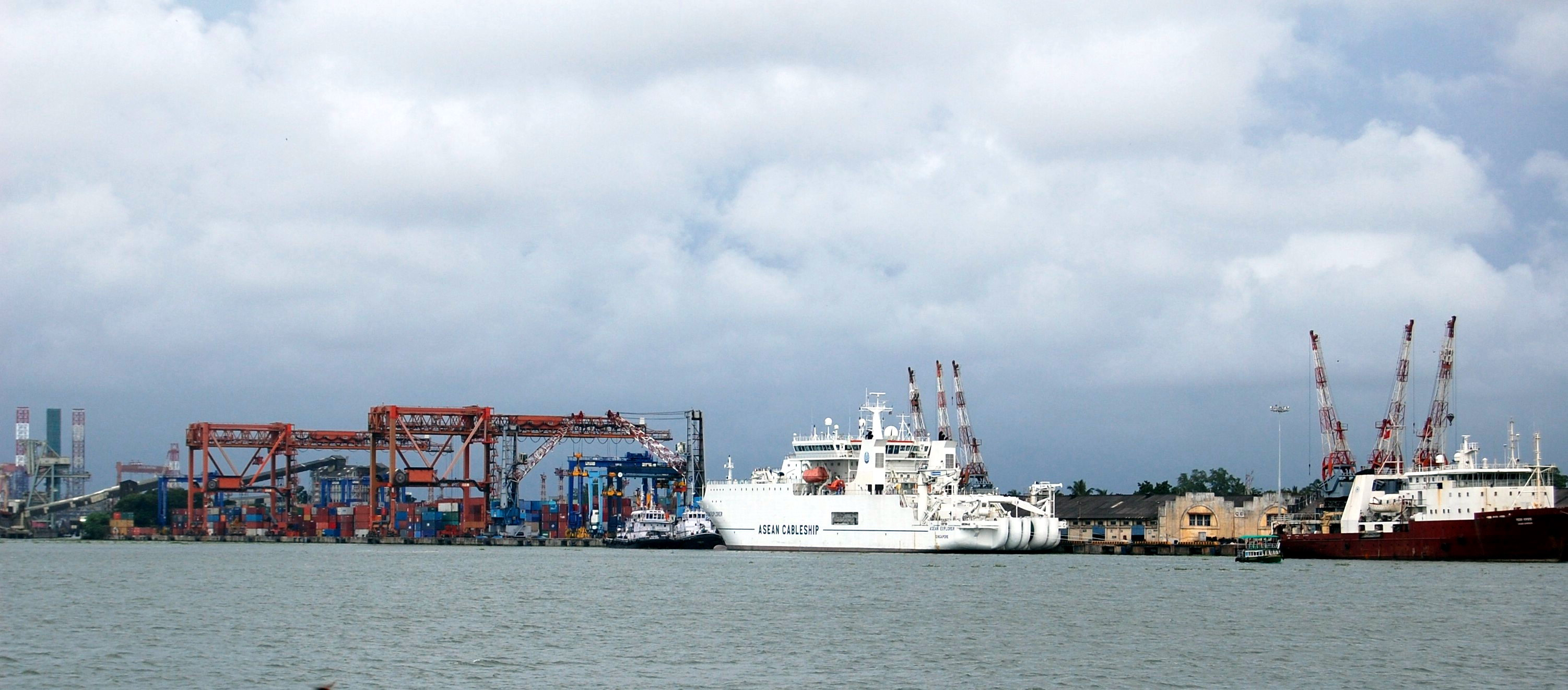 കൊച്ചി-തുറമുഖം